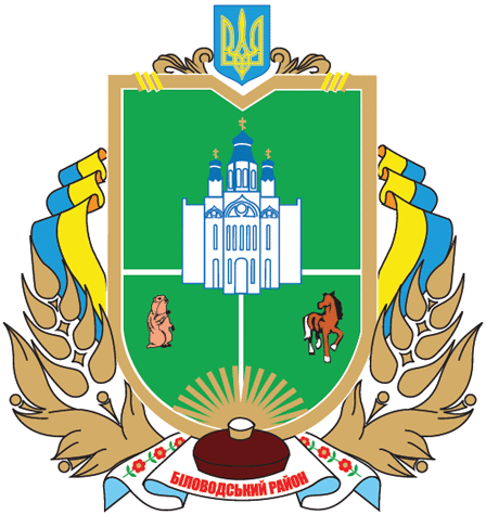 Герб Біловодського району